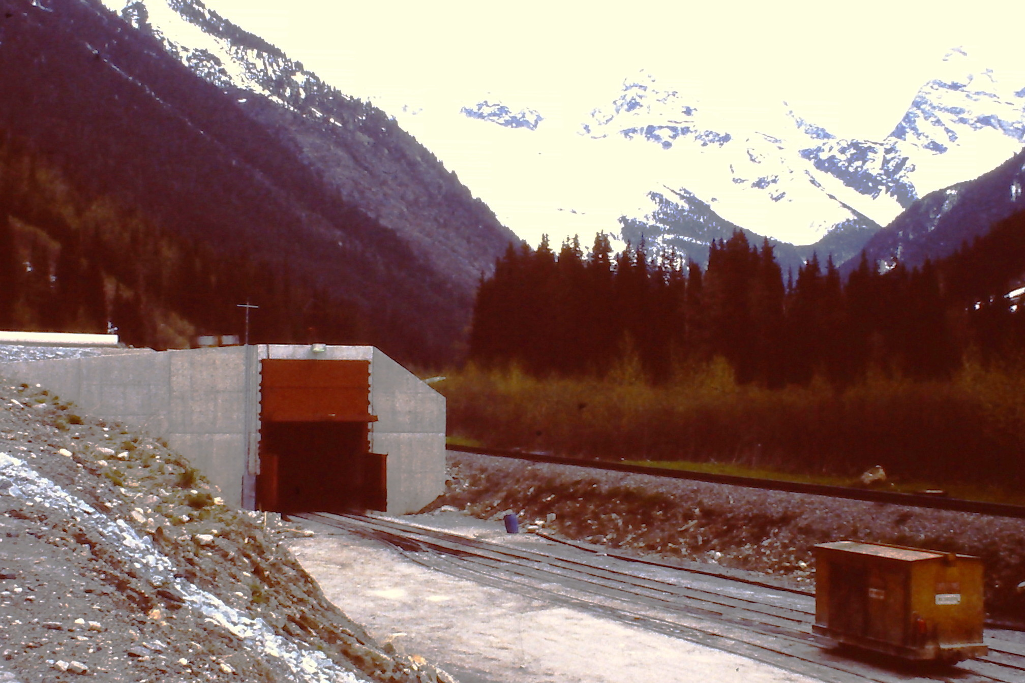 Mount-Macdonald-Tunnel Westportal (Bauphase)